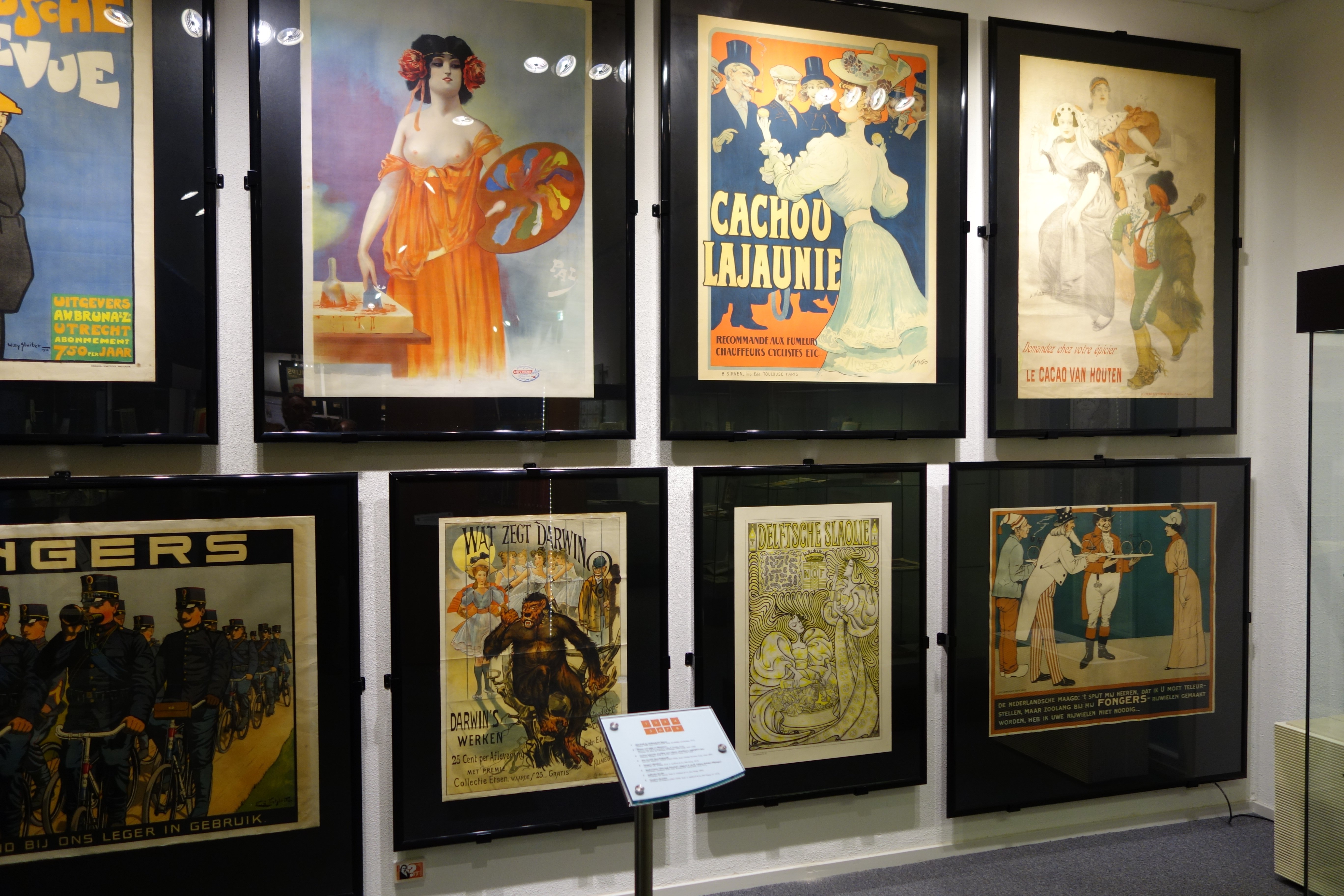 Enkele affiches uit de gestadig groeiende museumcollectie. Hieronder Jan Toorop en A. Willette